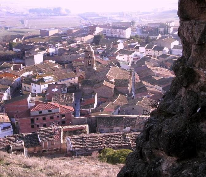 Algerri (La Noguera, Catalunya). Vista del poble des del castell